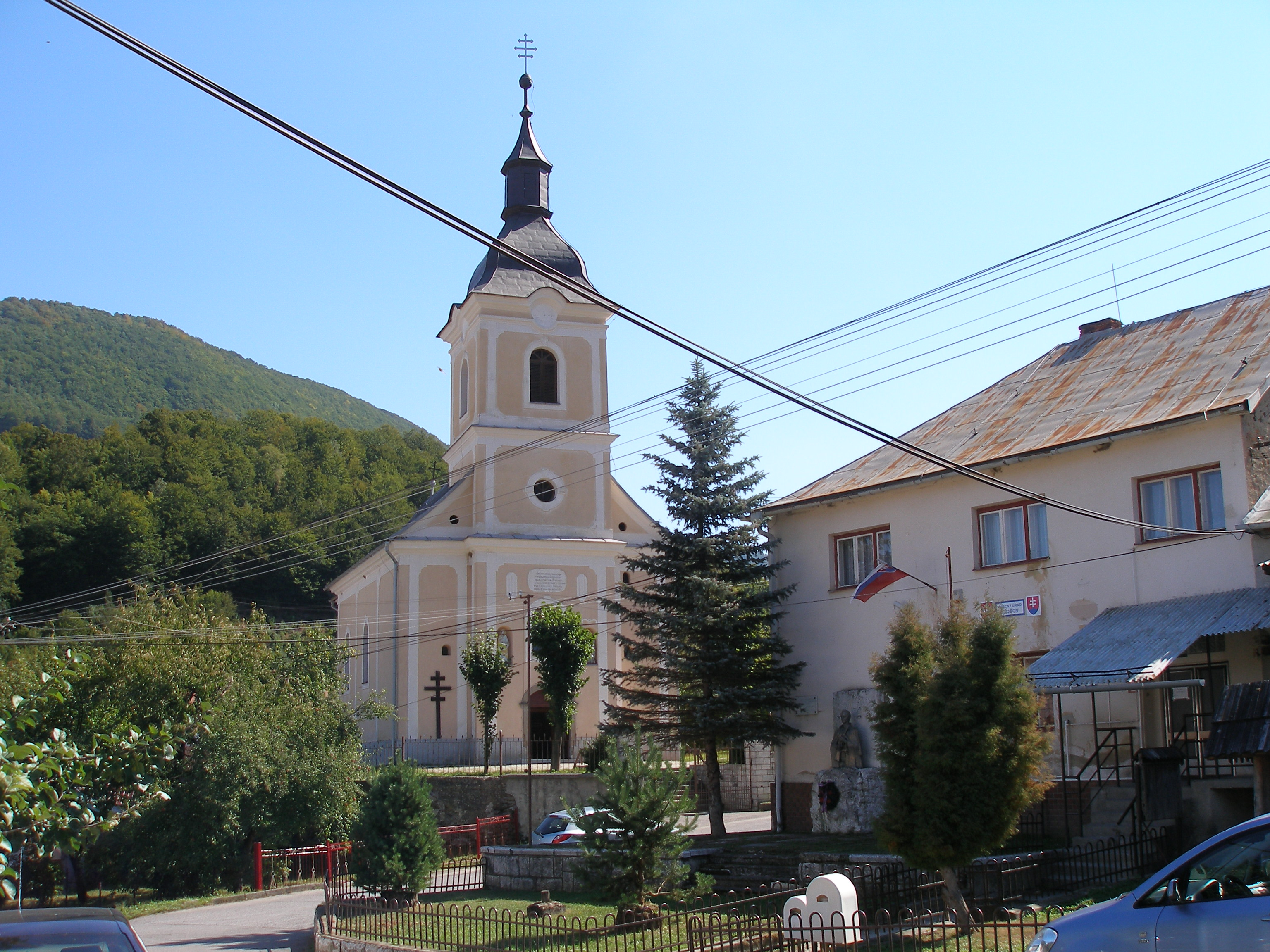 Spišská obec Kojšov. Okres Gelnica.